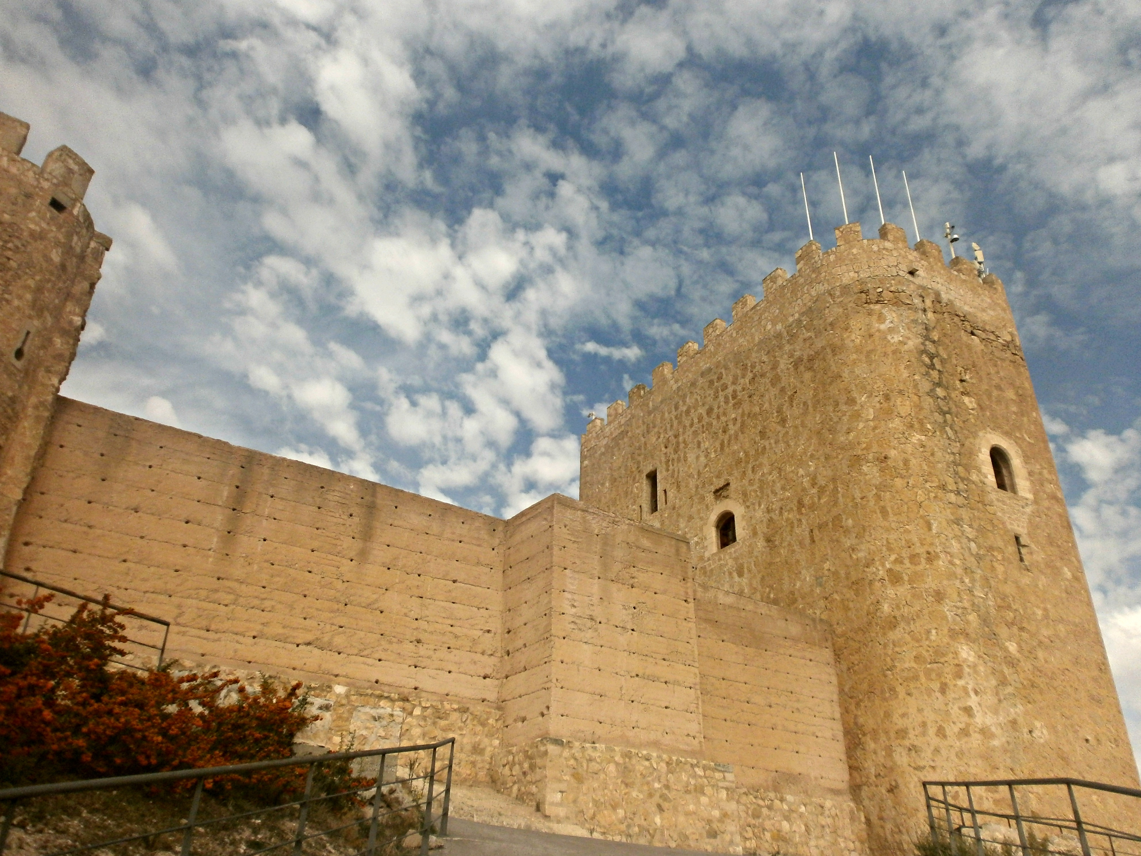 Castillo de Jumilla visto desde fuera